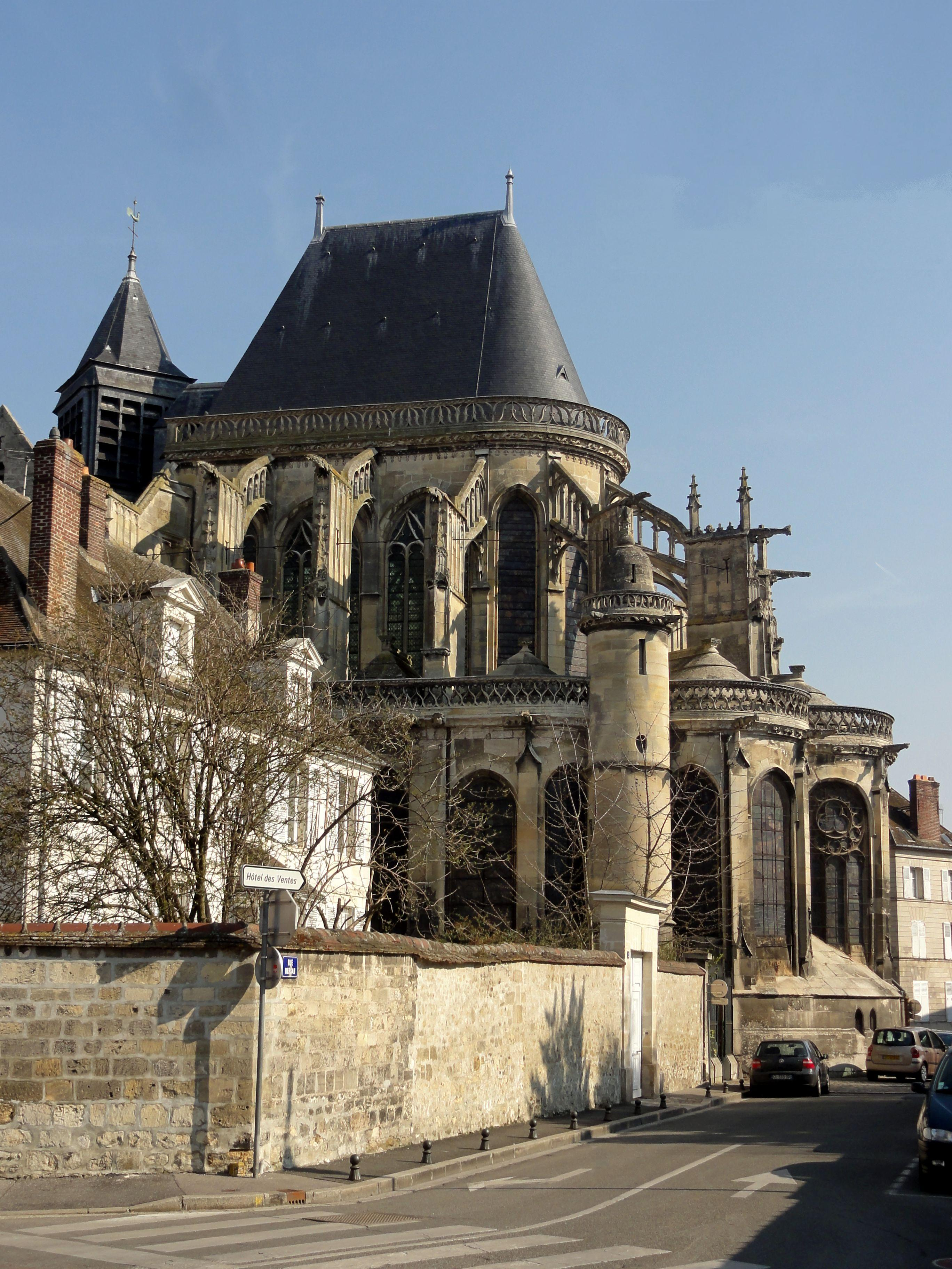 Vue du chœur depuis le sud.